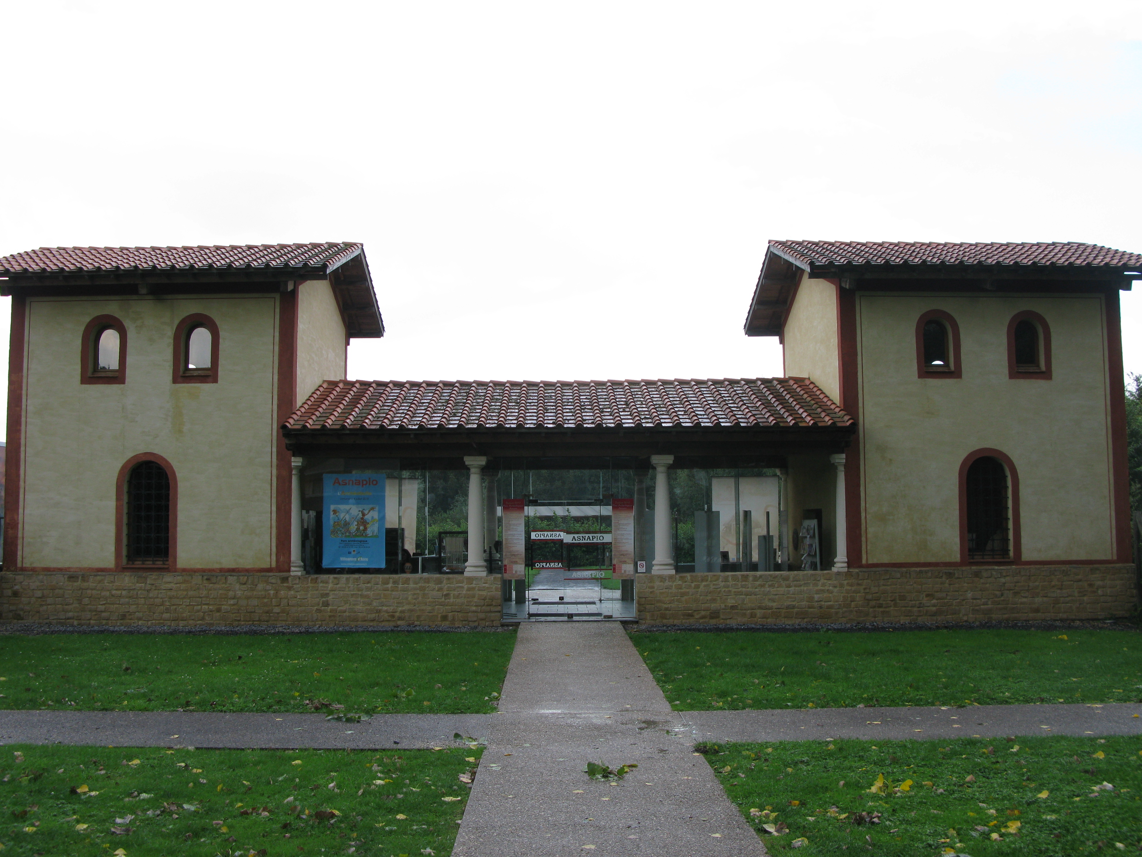 Parc archéologique Asnapio à Villeneuve d'Ascq. Entrée du musée, villa gallo-romaine.